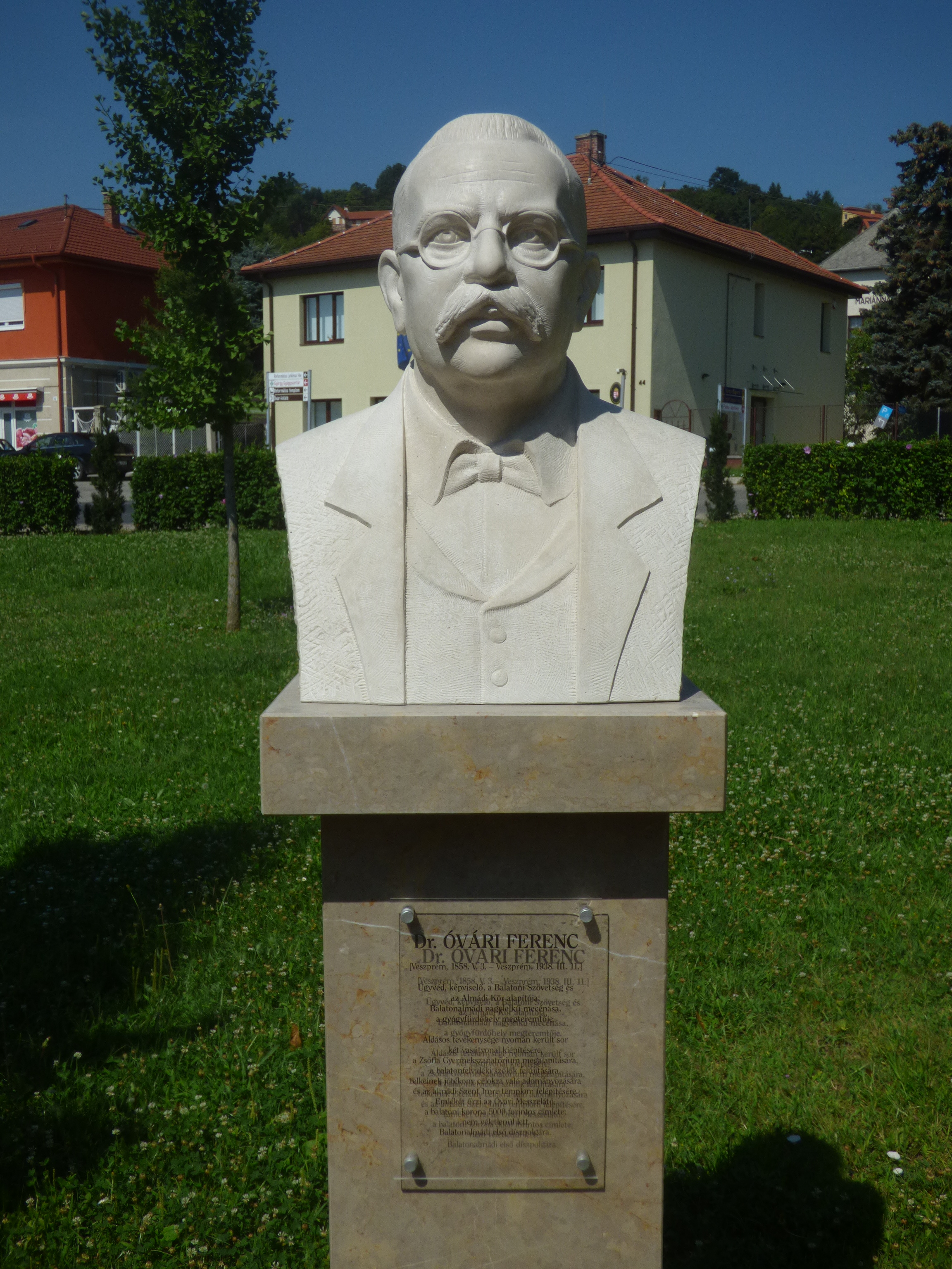 Óvári Ferenc mellszobra Balatonalmádiban